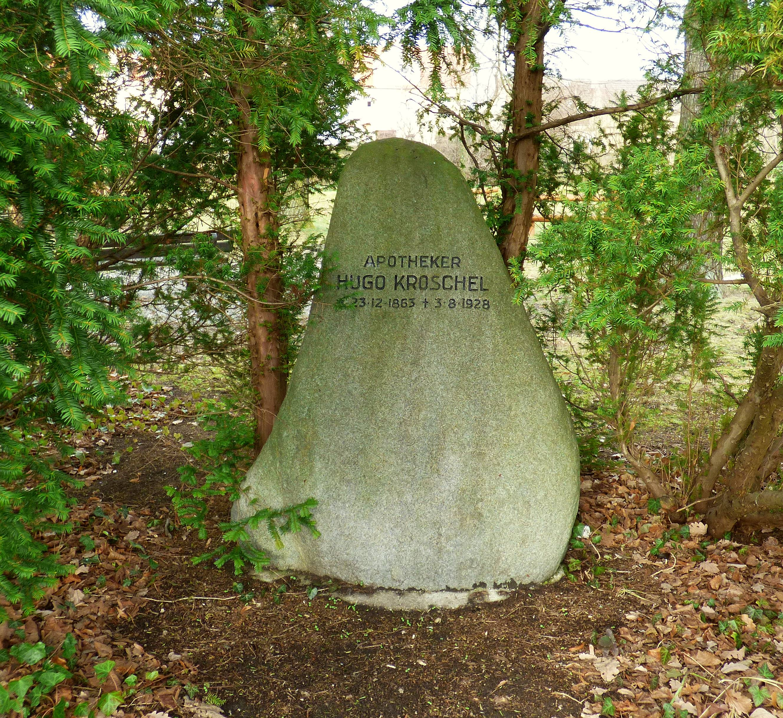 Grabmal des Apotheres Kroschel im Stadtpark von Elsterwerda